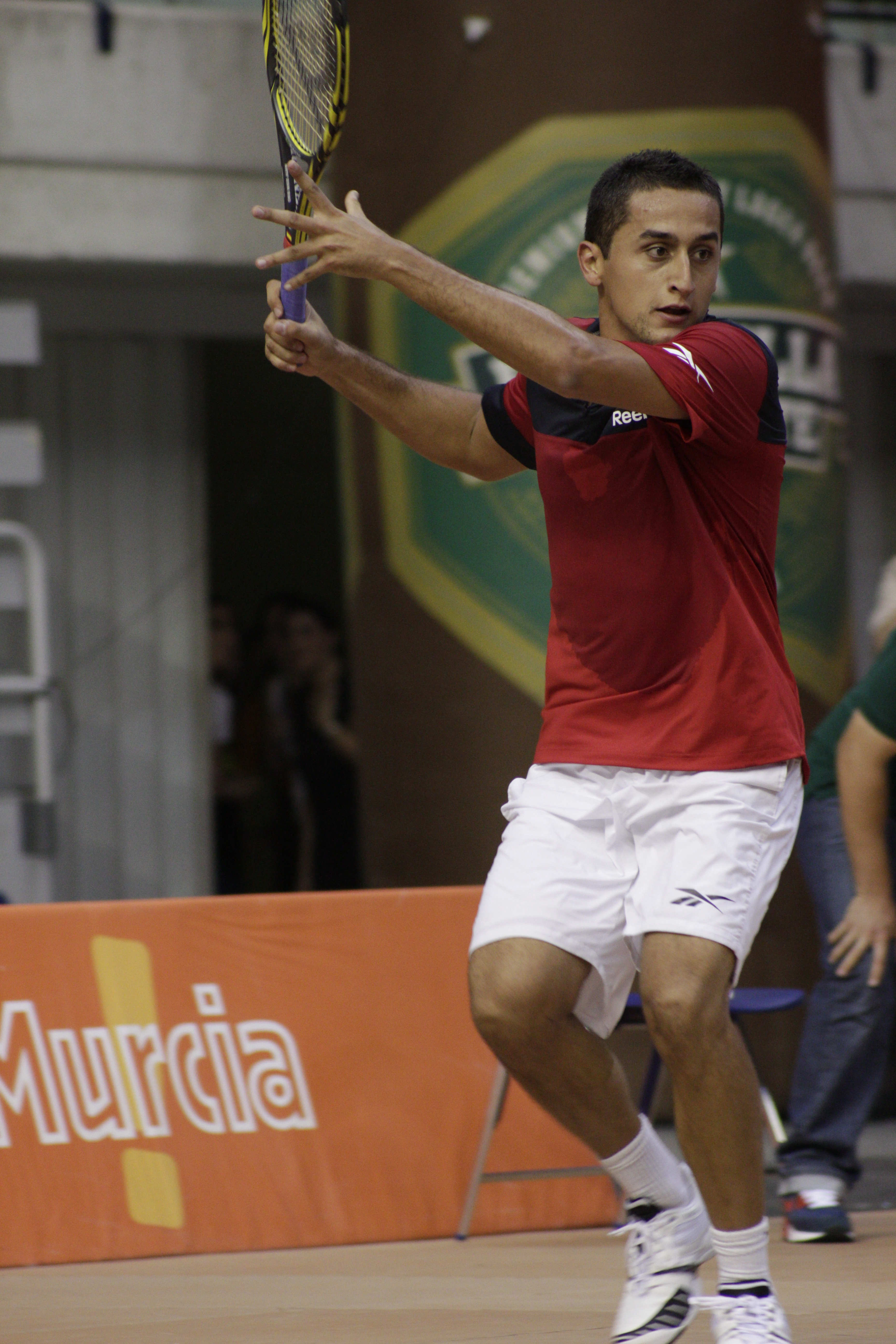 Almagro - Ferrero Partido en beneficio de los damnificados por el terremoto en Lorca